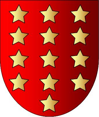 Armas de Salazar